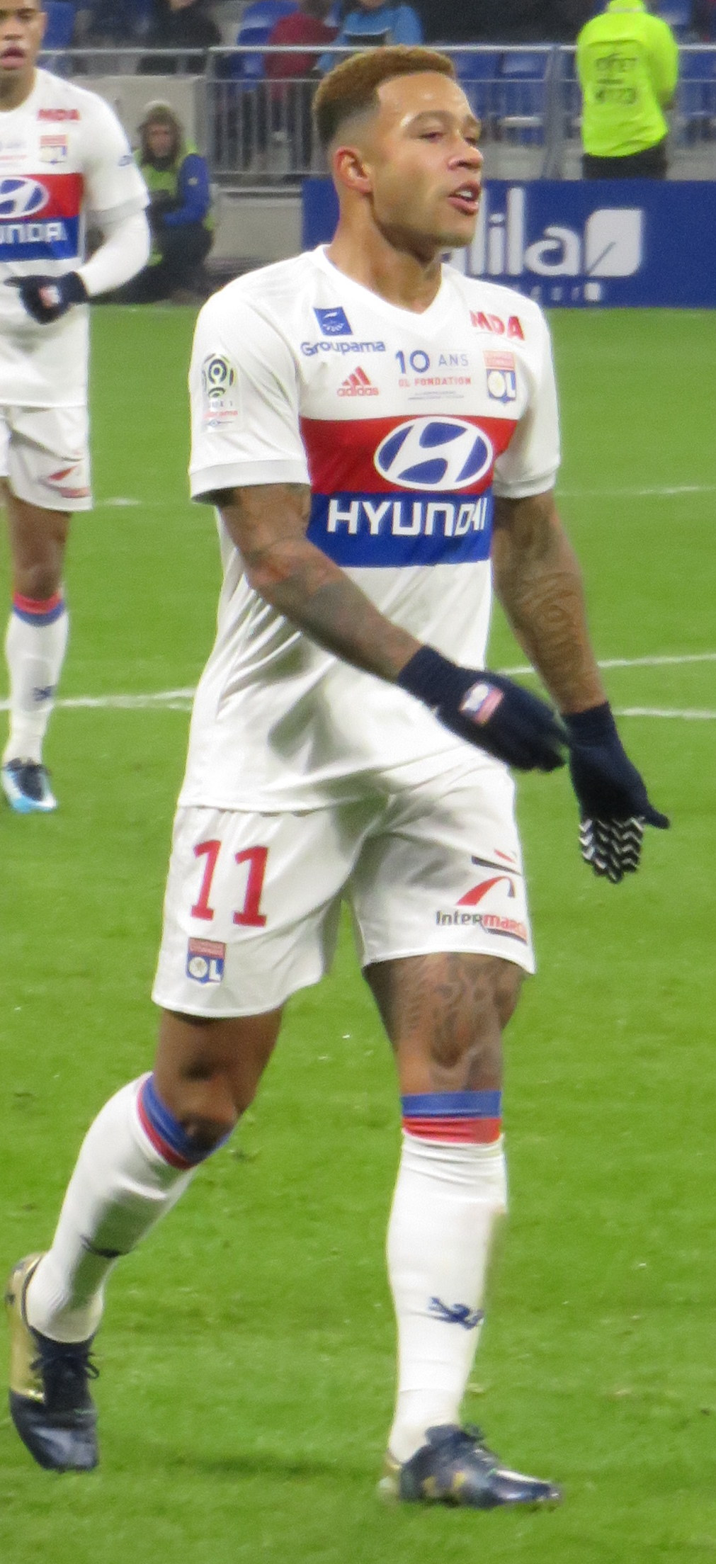 Memphis Depay lors du match Lyon-Montpellier (Ligue 1).